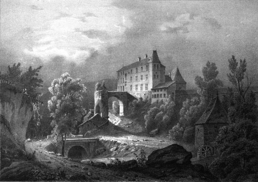 Album du Dauphiné - tome IV, litographie de chateau d'Alivet, près de Rives, Isère